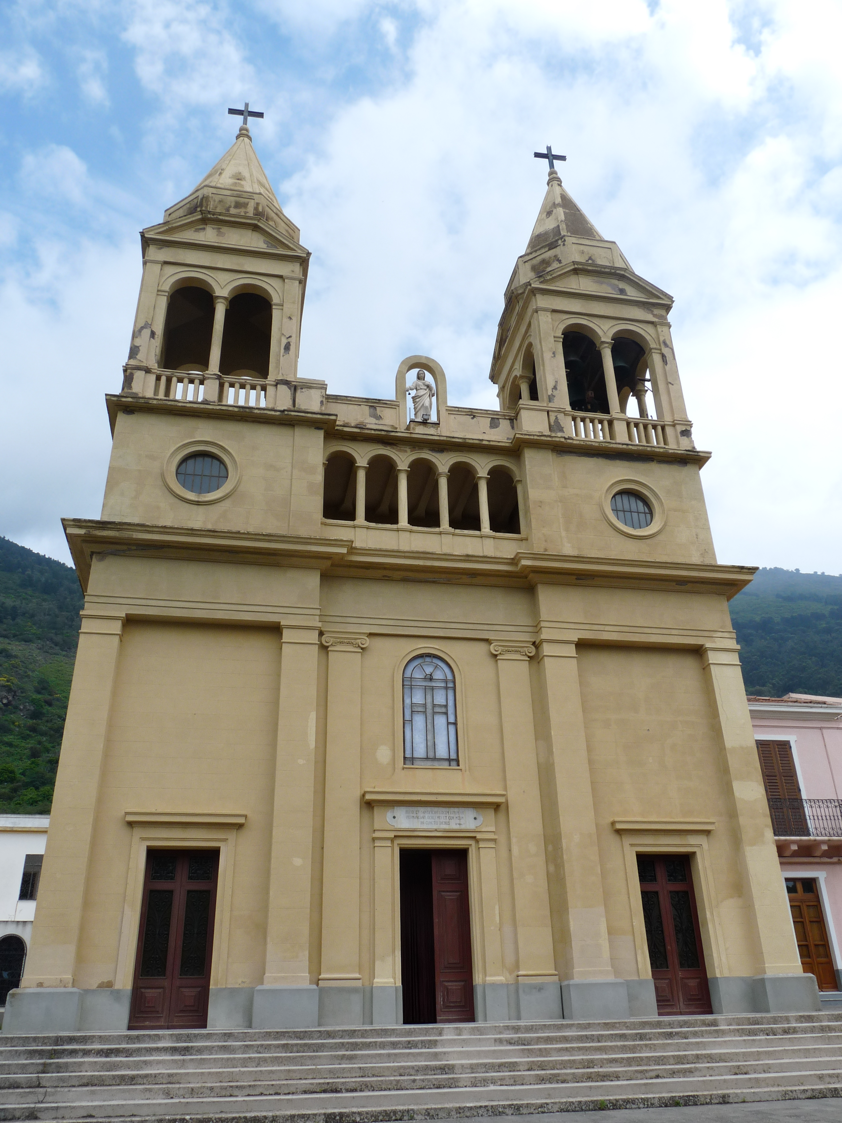 Santuario della Madonna del Terzito, à Valdichiesa sur l'île de Salina (îles Eoliennes, Sicile)